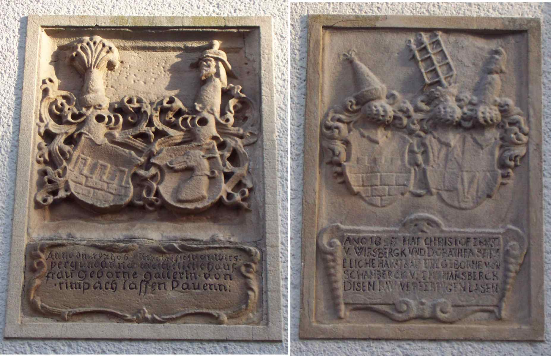 Die Wappensteine am ehemaligen Schloss (heute Kindergarten) in Lanzendorf (Himmelkron), Oberfranken